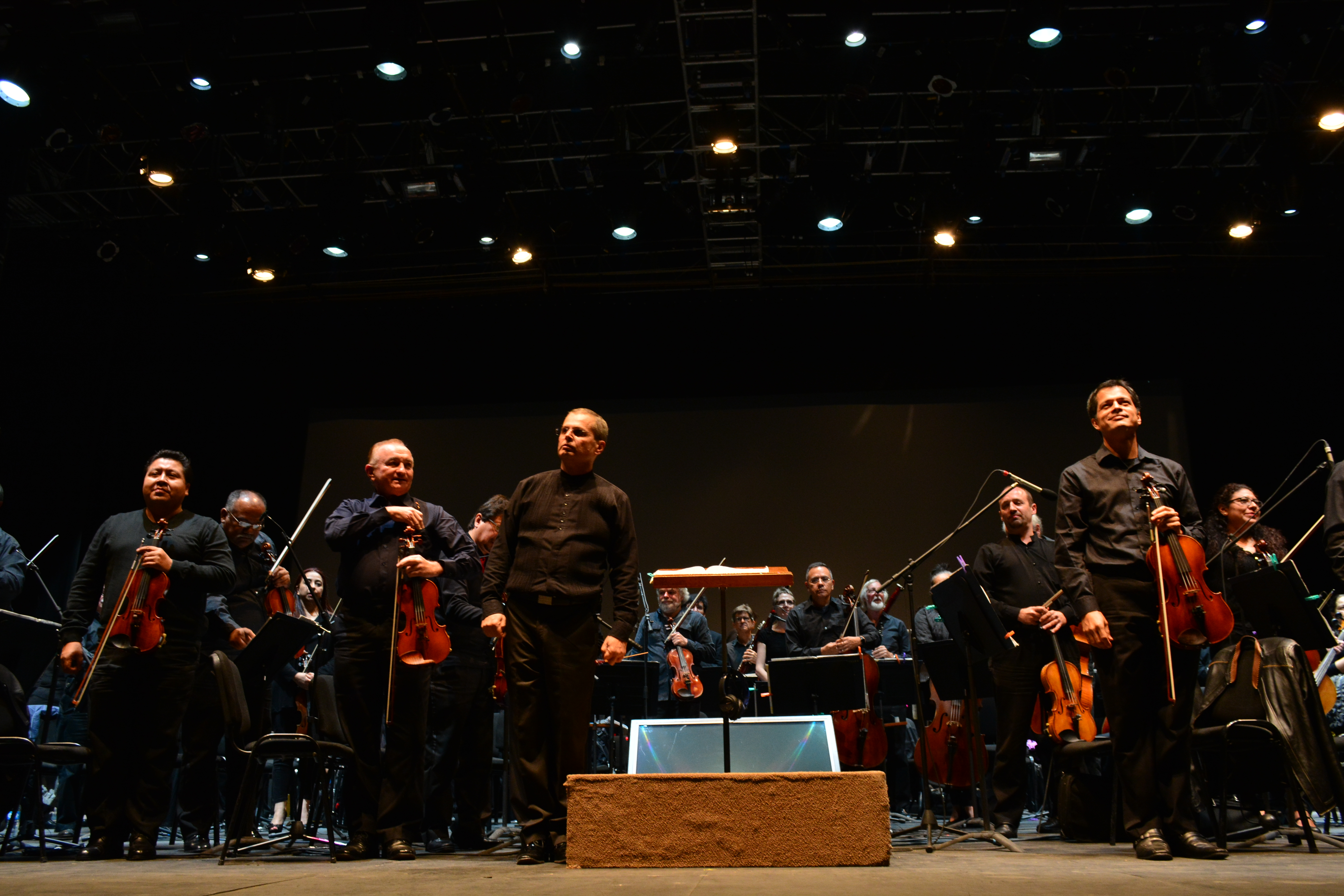 Los planetas de Holst por la Orquesta Sinfónica de Xalapa- Explanada de la Alhóndiga de Granaditas.